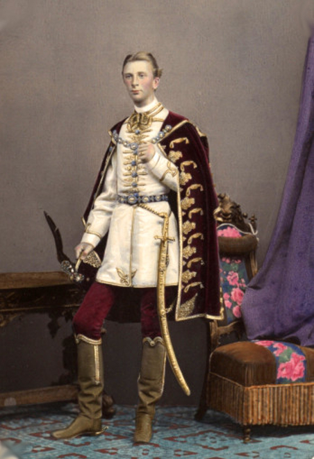 Gróf nagyapponyi Apponyi Albert György (Bécs, 1846. május 29. – Genf, 1933. február 7.) politikus, miniszter, belső titkos tanácsos, nagybirtokos, a Magyar Tudományos Akadémia tagja. Jászberény város aranymandátumos képviselője.